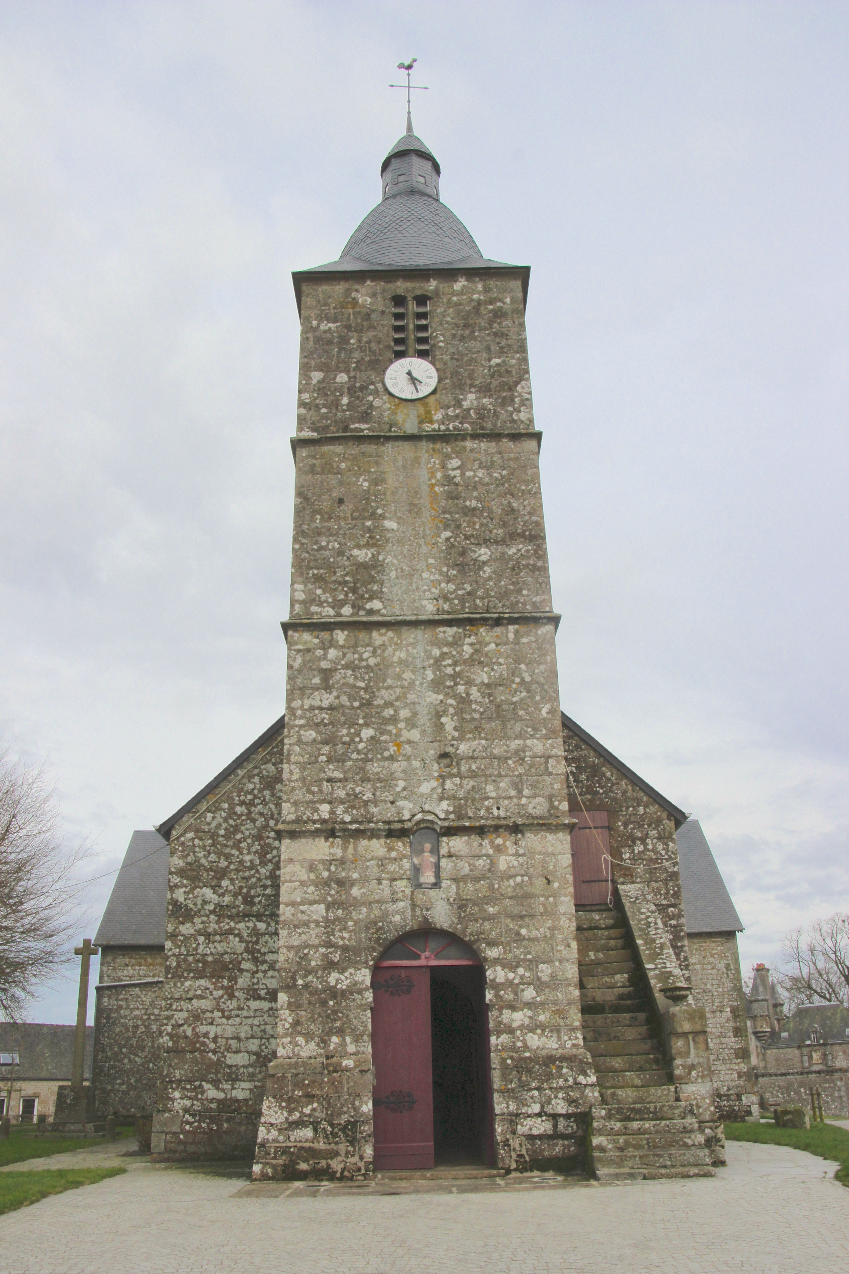 église de Beauvain